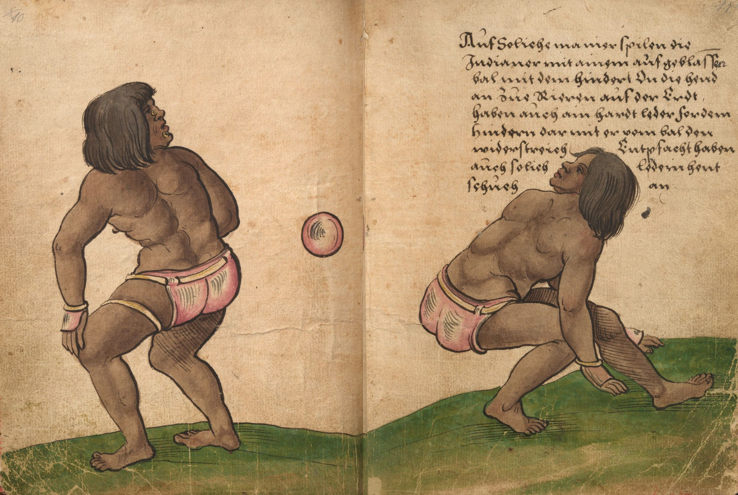 "Trachtenbuch" des Christoph Weiditz, Germanisches Nationalmuseum Nürnberg, Hs. 22474. Bl. 10–11 Indianer beim Ballspiel